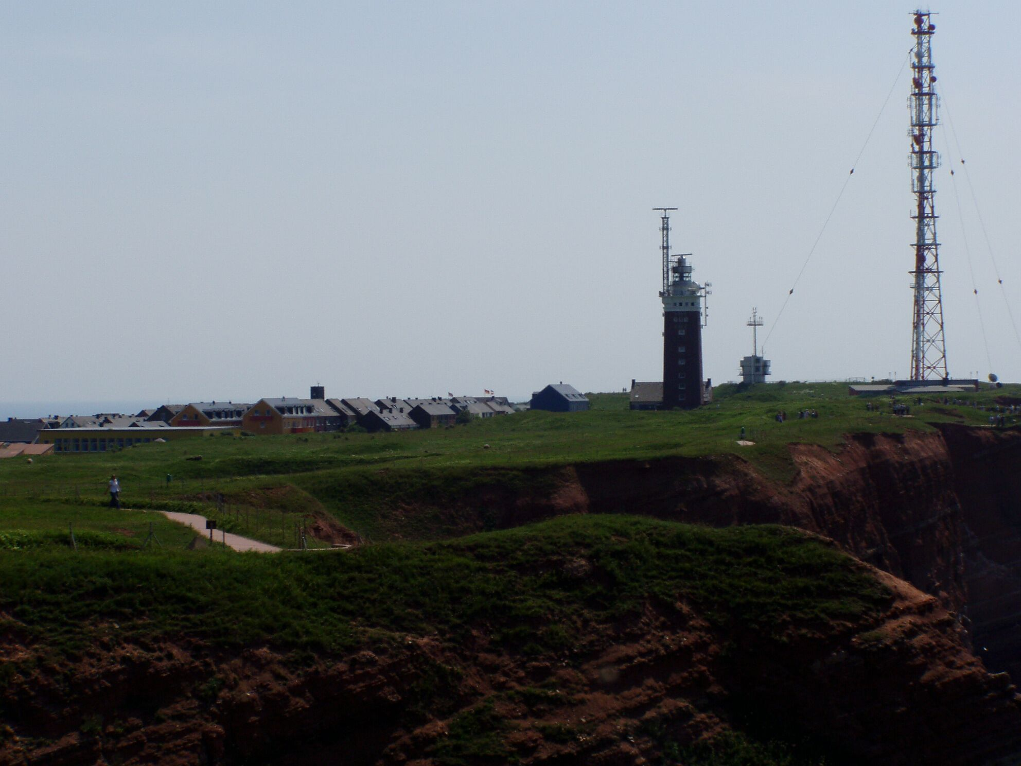 Helgoland Oberland